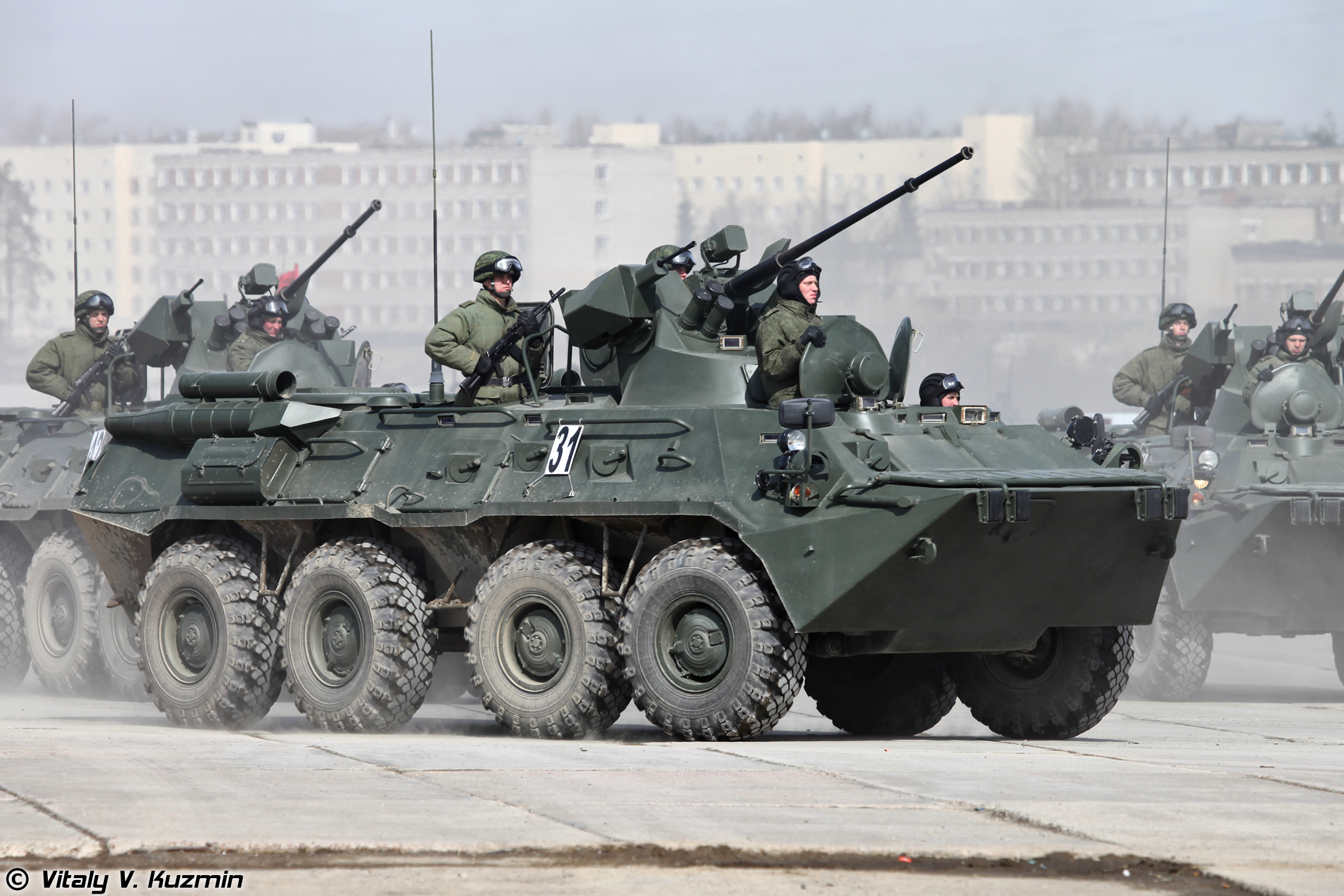 В этом году впервые в военном параде принимают участие модернизированные бронетранспортеры БТР-82А из состава 27 отдельной мотострелковой бригады (BTR-82A from 27th Separate Motor Rifle Brigade took part for the first time the the Parade)